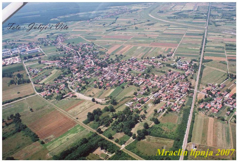 Mraclin iz zraka.